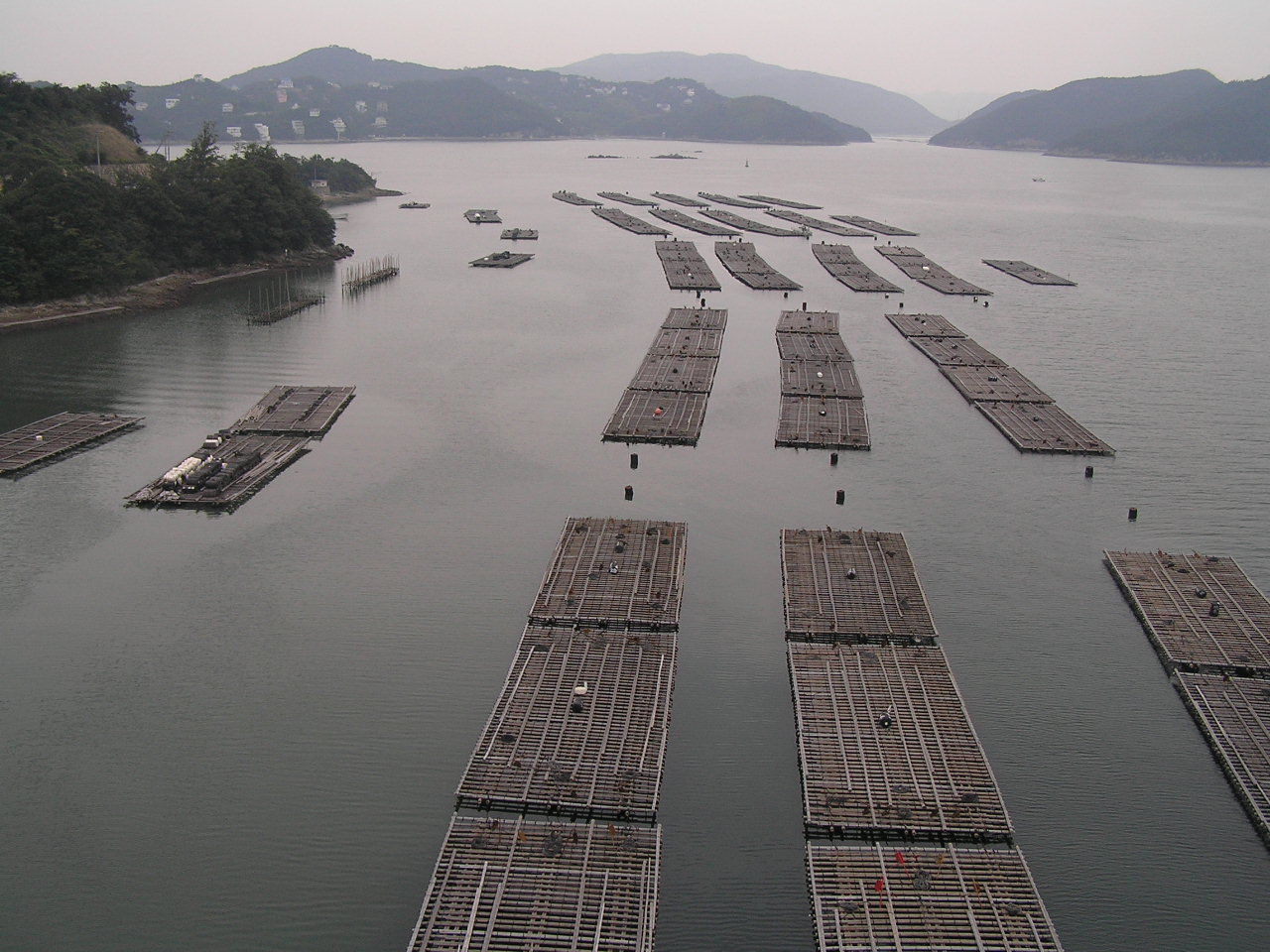 Kashira island in Bizen, Okayama,Japan 岡山県備前市日生町日生,頭島 牡蠣いかだ